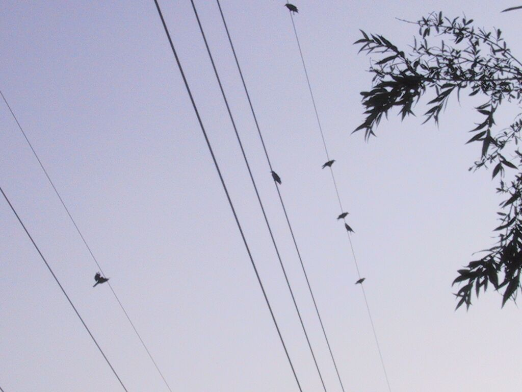 Een kraai zit op een hoogspanningsdraad die 50 kV voert. De andere zitten op de bliksemdraden